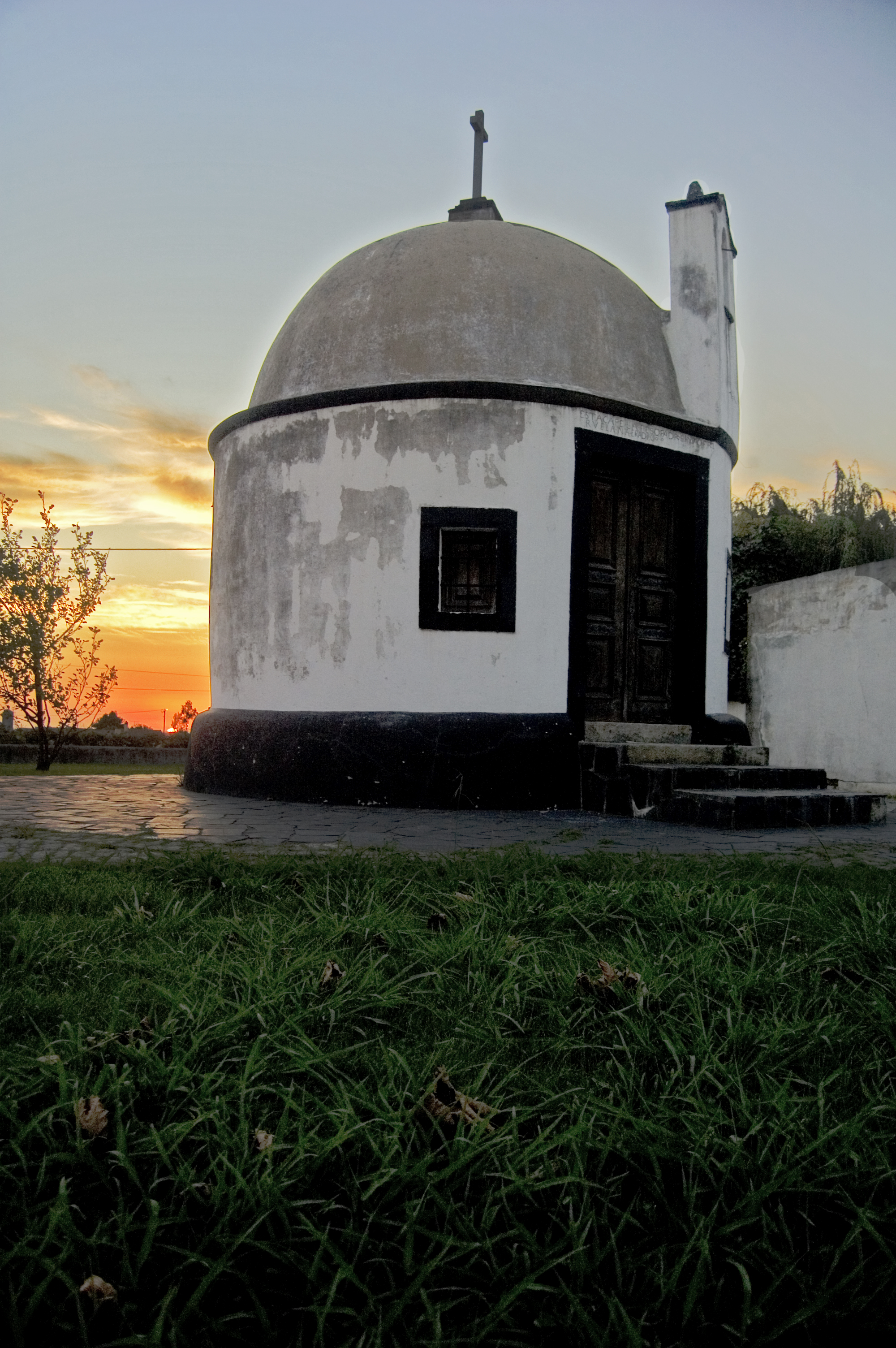 Capela de São Simão, no Bunheiro, Murtosa This file was uploaded for Wiki Loves Monuments in Portugal with the unique identifier 71069.